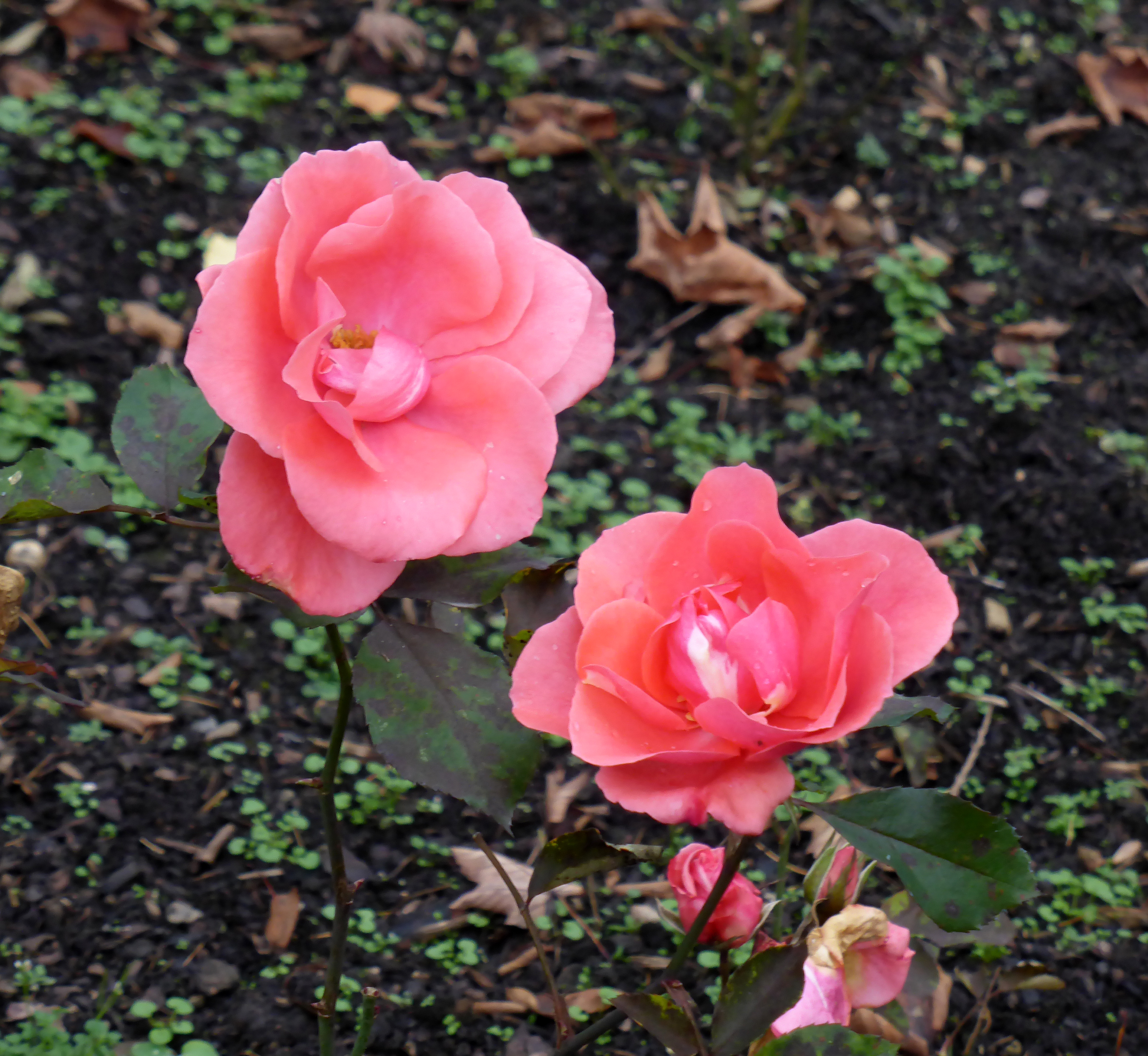 Rose: City of Leeds. Züchter: Samuel Darragh McGredy 1962.